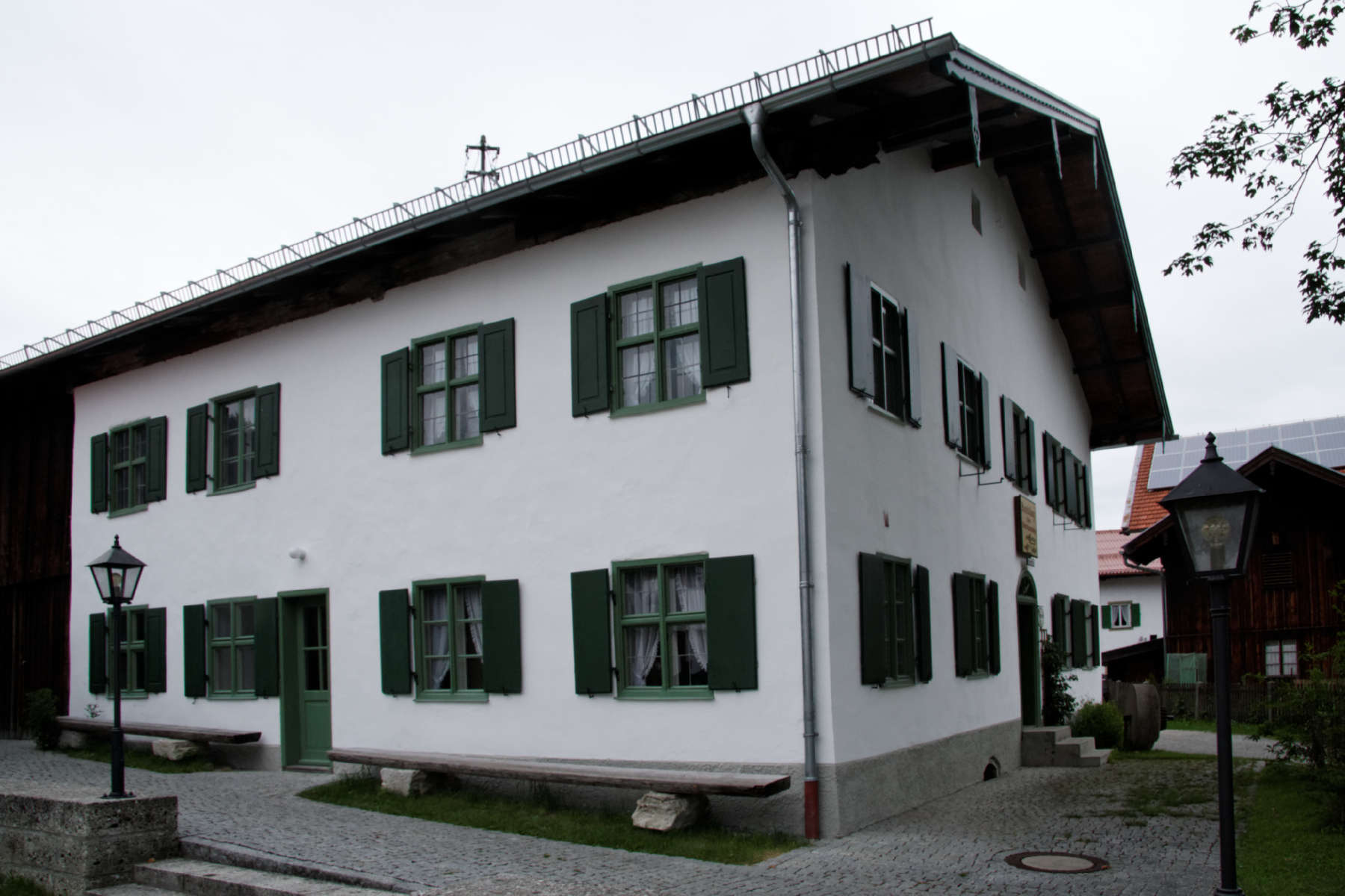 Unterammergau, ehemaliges Forsthaus (heute Wetzsteinmuseum) mit Musikpavillon am Dorfplatz 7